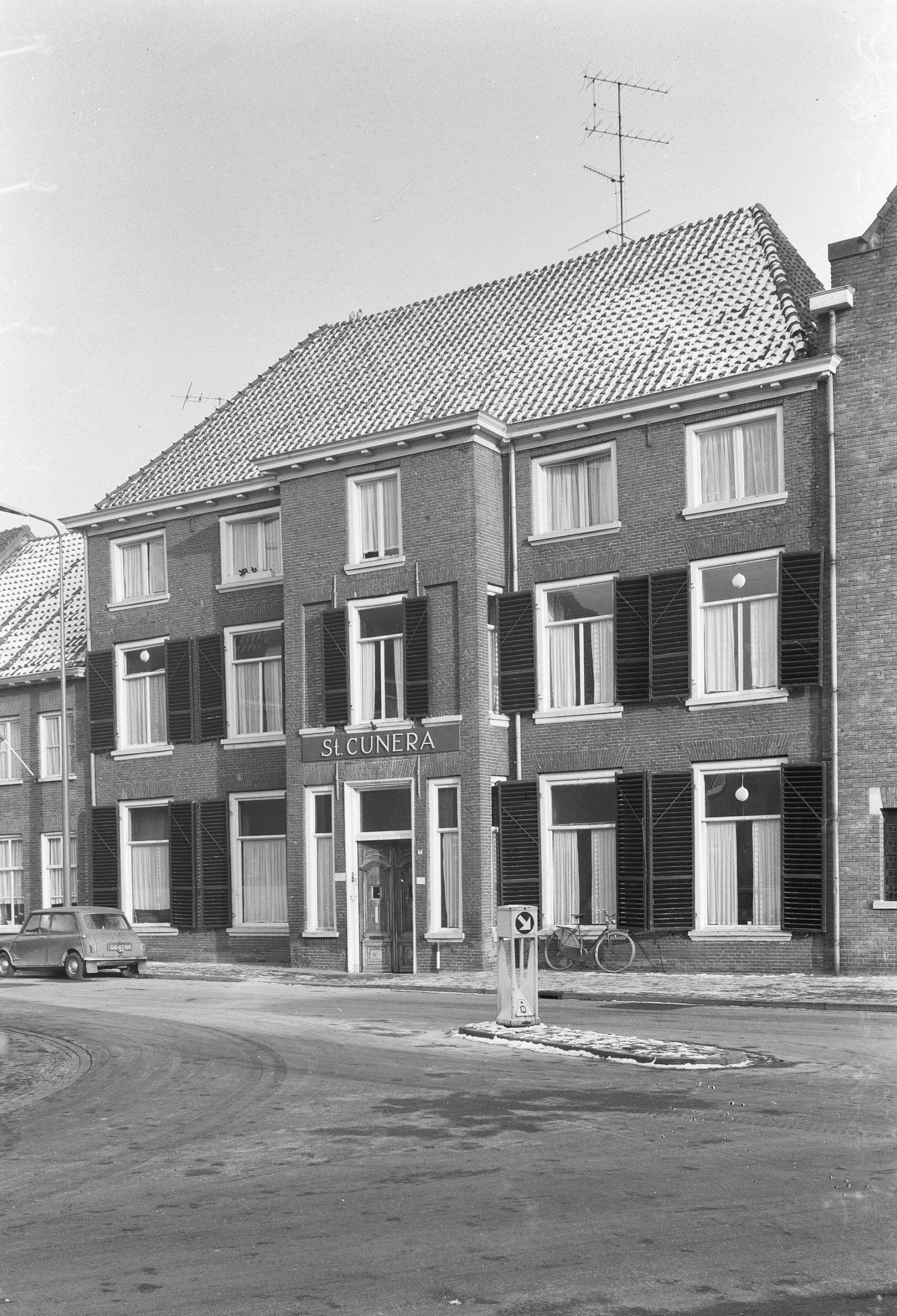 voorgevel